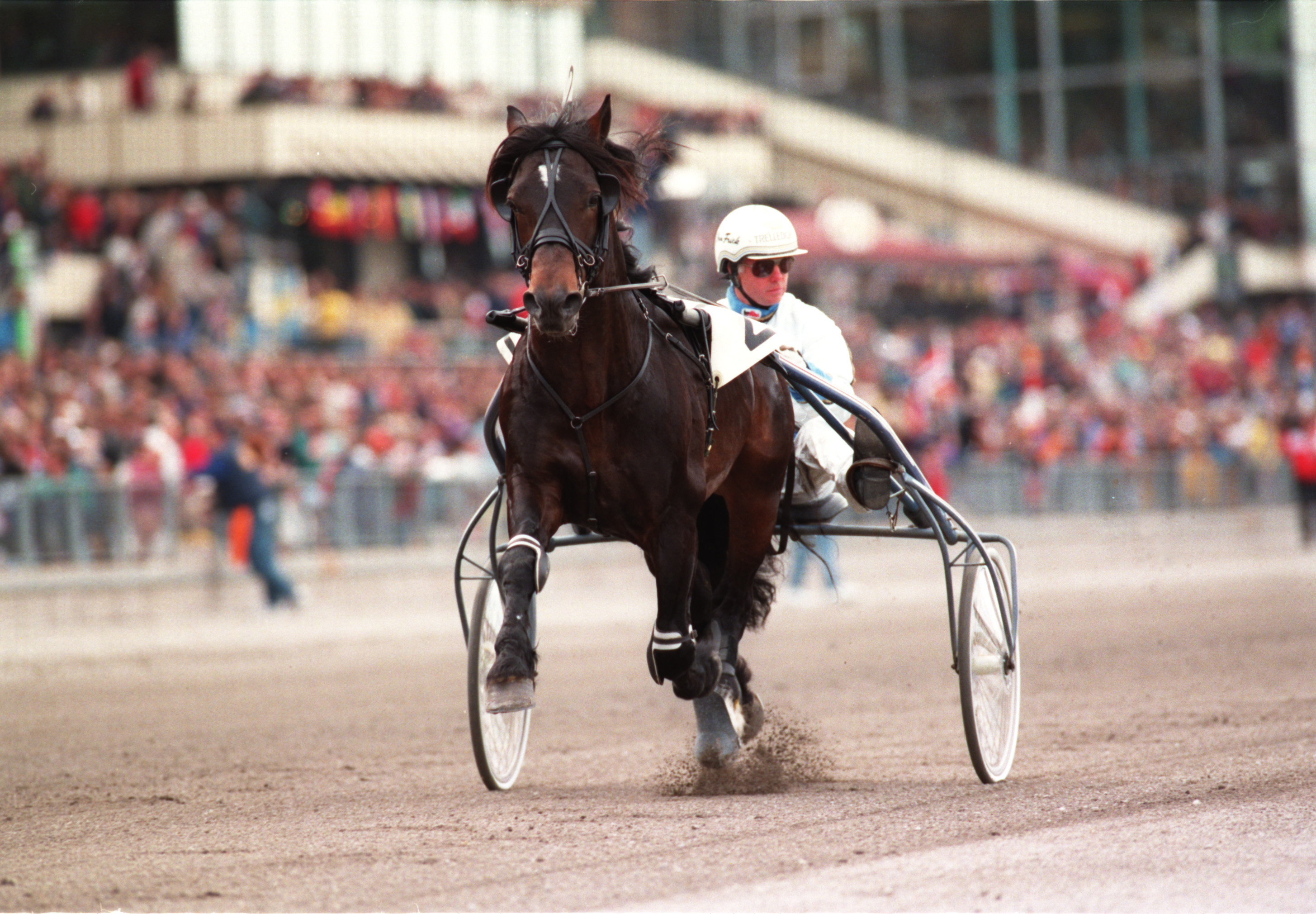 Kusken Jim Frick med kallblodstravaren Verner på Solvalla 1997.